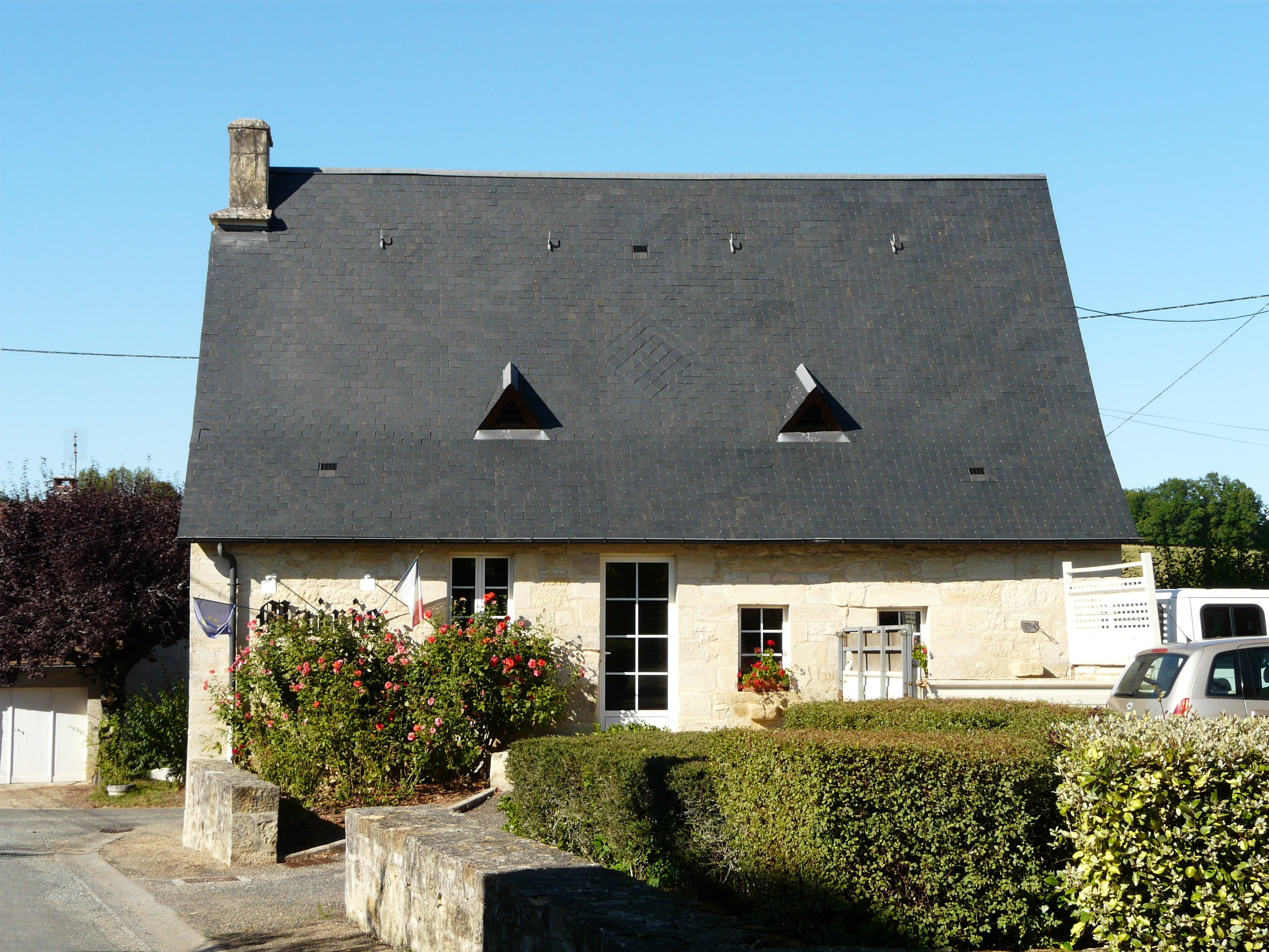 La mairie de La Chapelle-Saint-Jean, Dordogne, France.